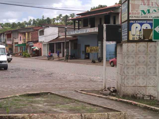 Nazaré, Bahia, Brasil.